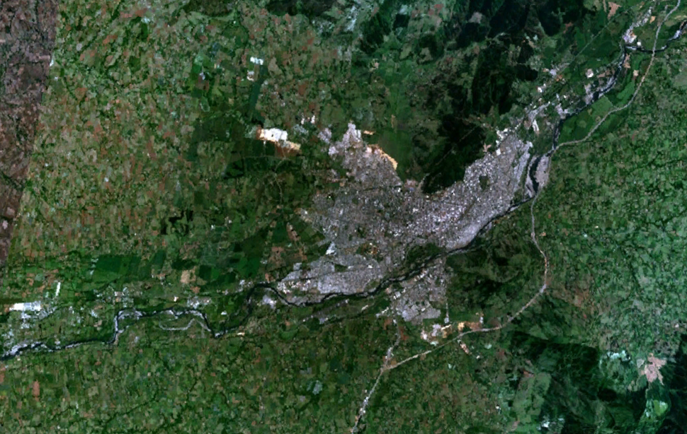 Imagen satelital de la conurbación del Gran Temuco (Temuco y Padre Las Casas), la ciudad de Labranza y la localidad de Cajón, en la región de La Araucanía, Chile.